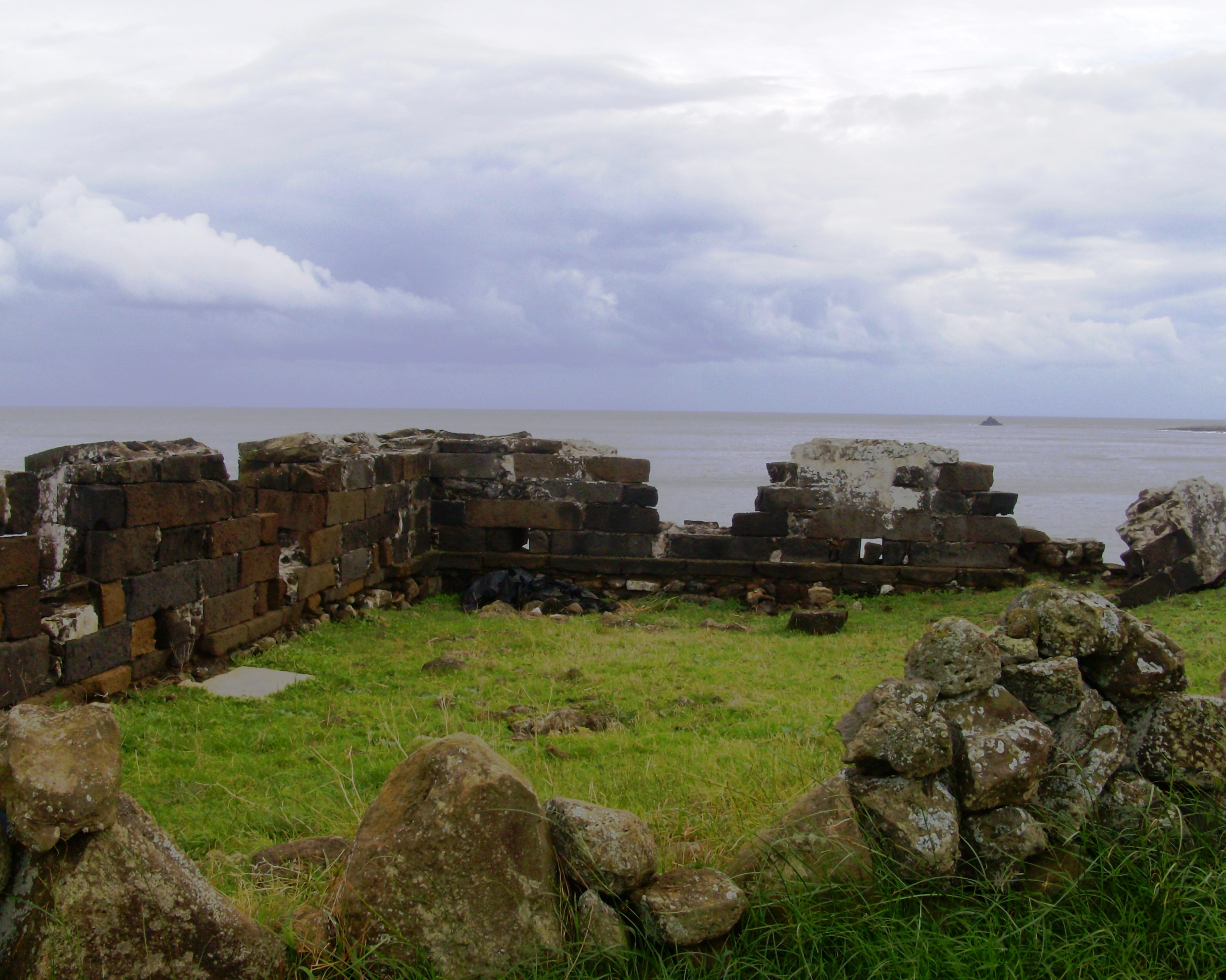 Forte do Pesqueiro dos Meninos, baía do Porto Novo, concelho de Angra do Heroísmo, Ilha Terceira, Açores.